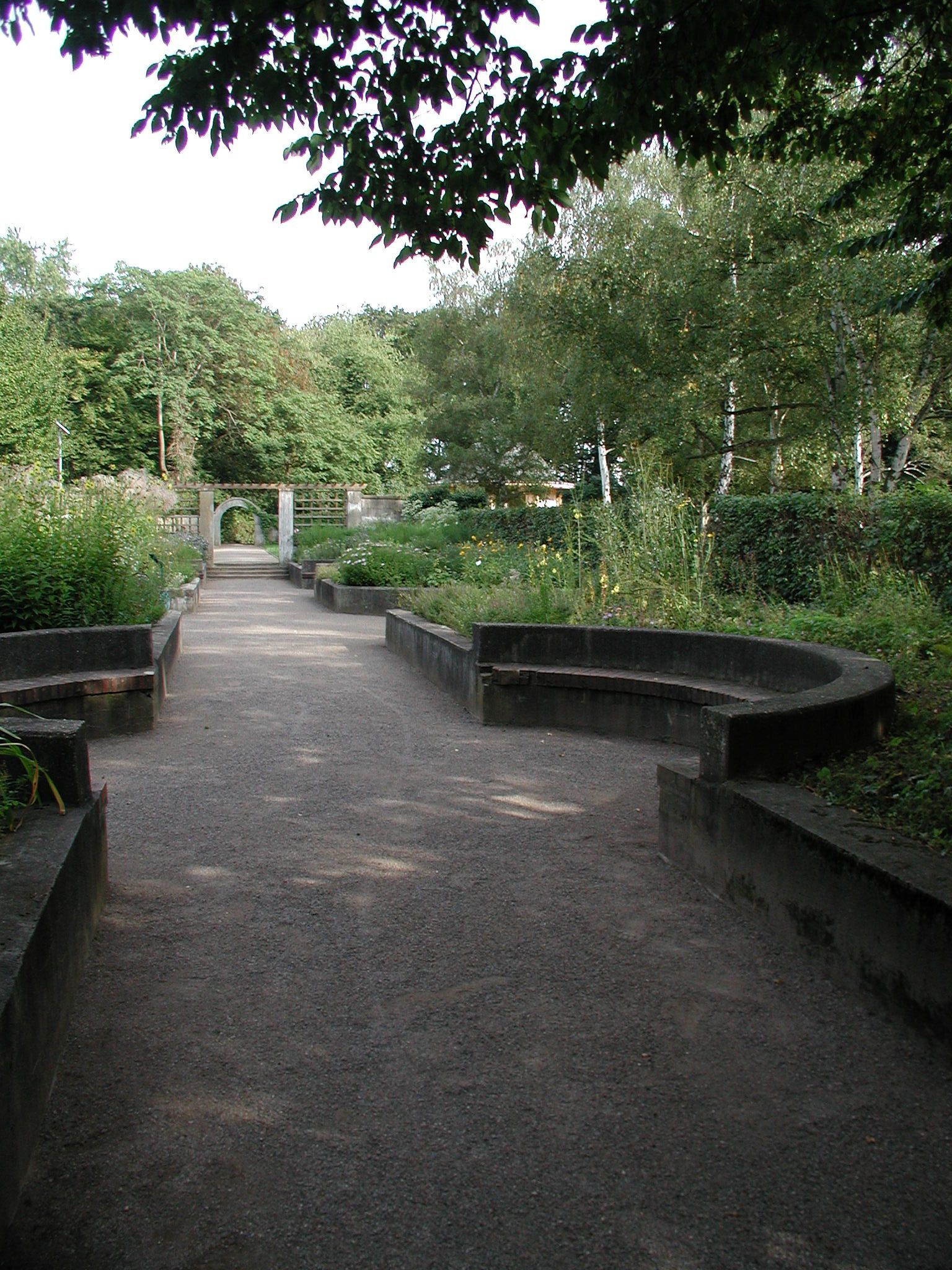 Koeln-Fritz-Enke-Volkspark